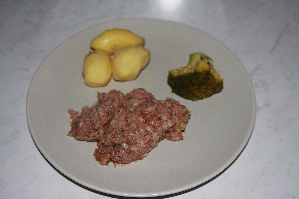 Hakkasteik